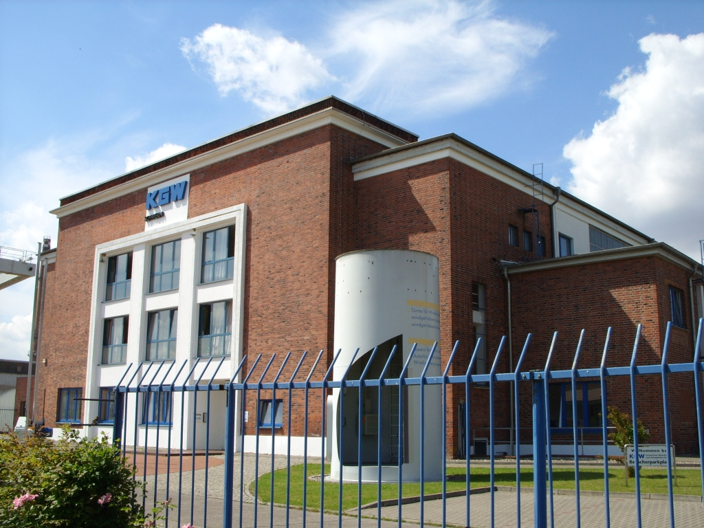 KGW Schweriner Maschinenbau GmbH